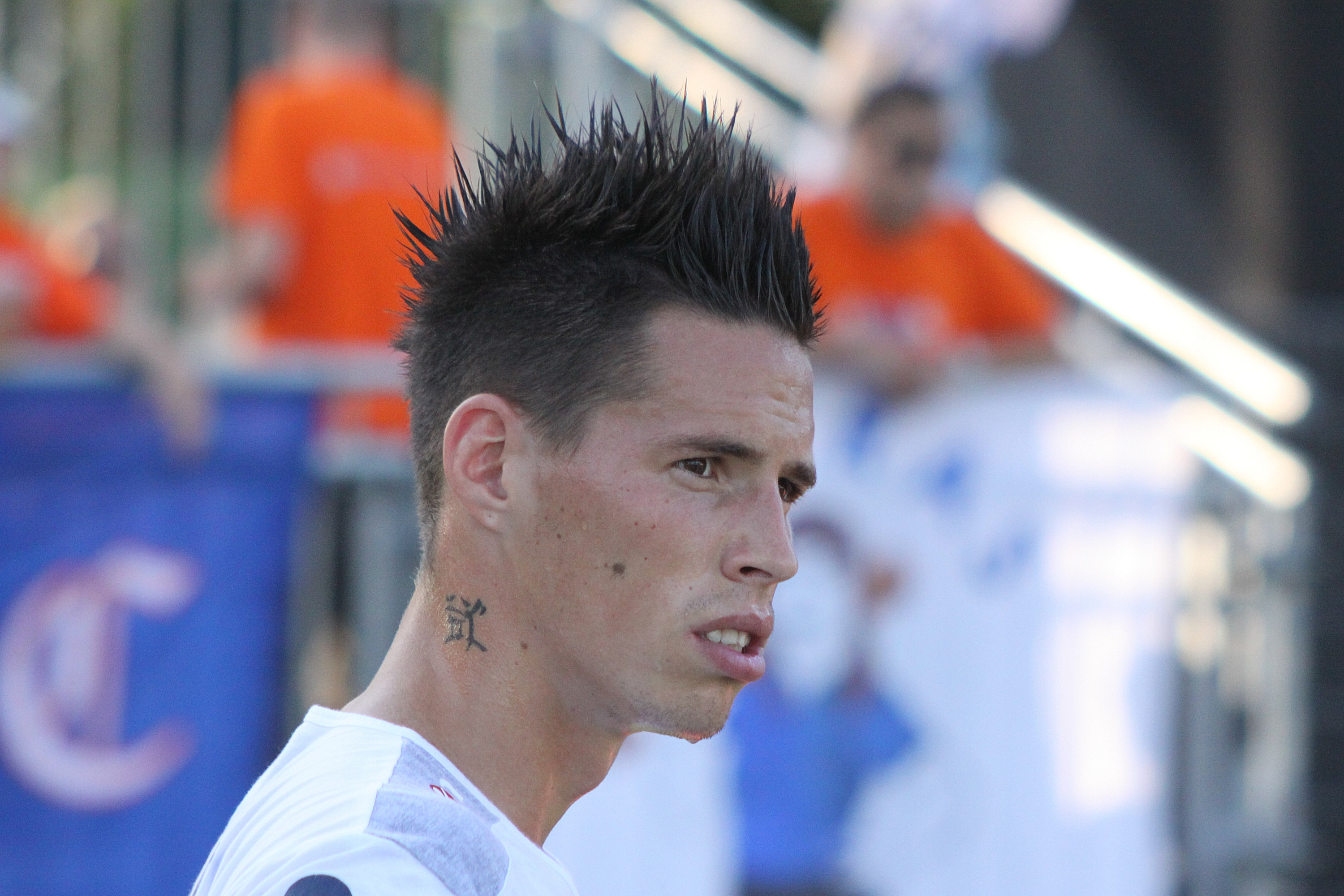 Marek Hamšík - SSC Neapel (2) Marek Hamšík - Società Sportiva Calcio Napoli